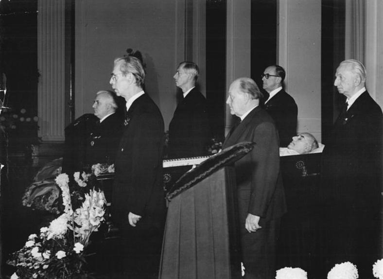 Berlin, Trauerfeier Johannes R. Becher Zentralbild- Ulm-Quasch 14.10.1958 Bevölkerung nahm Abschied von Johannes R. Becher Die sterblichen Überreste des großen deutschen Dichters Dr. Johannes R. Becher, Minister für Kultur der DDR, wurden am 14.10.1958 im großen Saal des Hauses der Ministerien aufgebahrt. UBz: Ehrenwache am Sarge des Verstorbenen v.l.n.r.: Dr. Bredel, Vizepräsident der Akademie der Künste; Prof. Nagel, Präsident der Akademie der Künste; Leo Spies; Prof. Ehmsen; Walter Felsenstein, Vizepräsident der Akademie der Künste und Dr. Butting. Abgebildete Personen: Nagel, Otto Prof.: Maler, Präsident der Akademie der Künste (AdK), Nationalpreisträger, Vaterländischer Verdienstorden (VVO) in Gold, DDR (GND 118586300) Bredel, Willi: Schriftsteller, Vizepräsident der Akademie der Künste, DDR Spies, Leo Prof.: Komponist, Mitglied der Akademie der Künste (AdK), Nationalpreis 1957, DDR (GND 118752022) Ehmsen, Heinrich Prof.: Maler, Grafiker, Mitglied der Akademie der Künste, DDR (GND 118529242) Felsenstein, Walter Prof.: Intendant der Komischen Oper, Vizepräsident der Akademie der Künste (AdK), DDR Butting, Max Prof. Dr.: Komponist, Mitglied der Akademie der Künste (AdK), Nationalpreis 1954, DDR